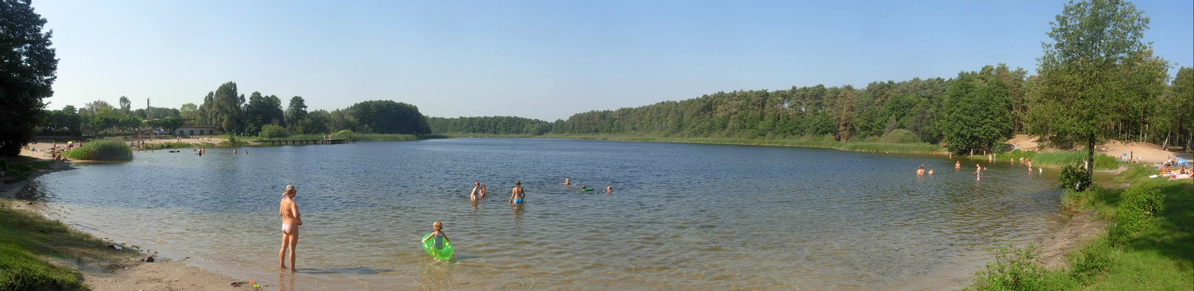 Jezioro Jezuickie (Piecki)